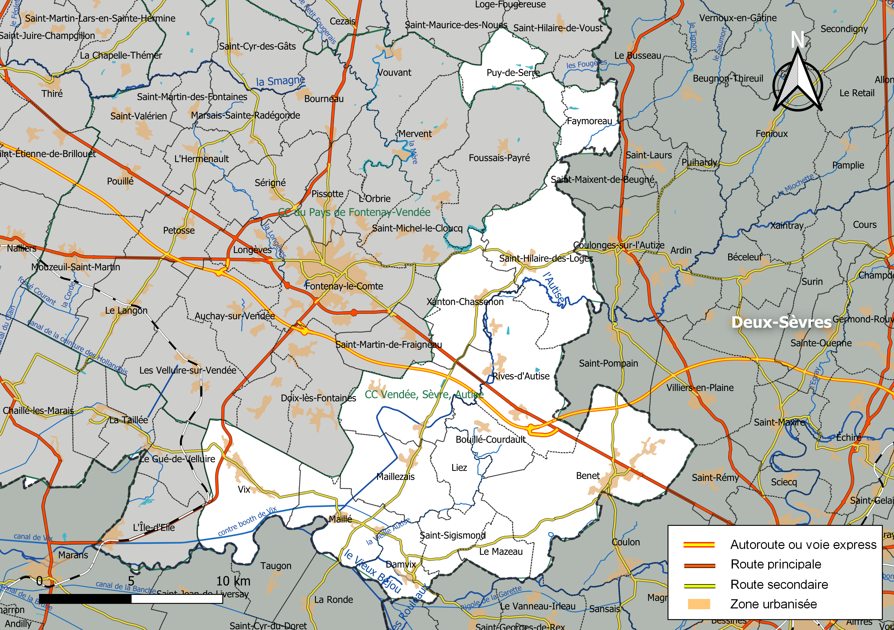 Carte géographique de la Communauté de communes Vendée-Sèvre-Autise, département de la Vendée, France. Composition au 1er janvier 2019.